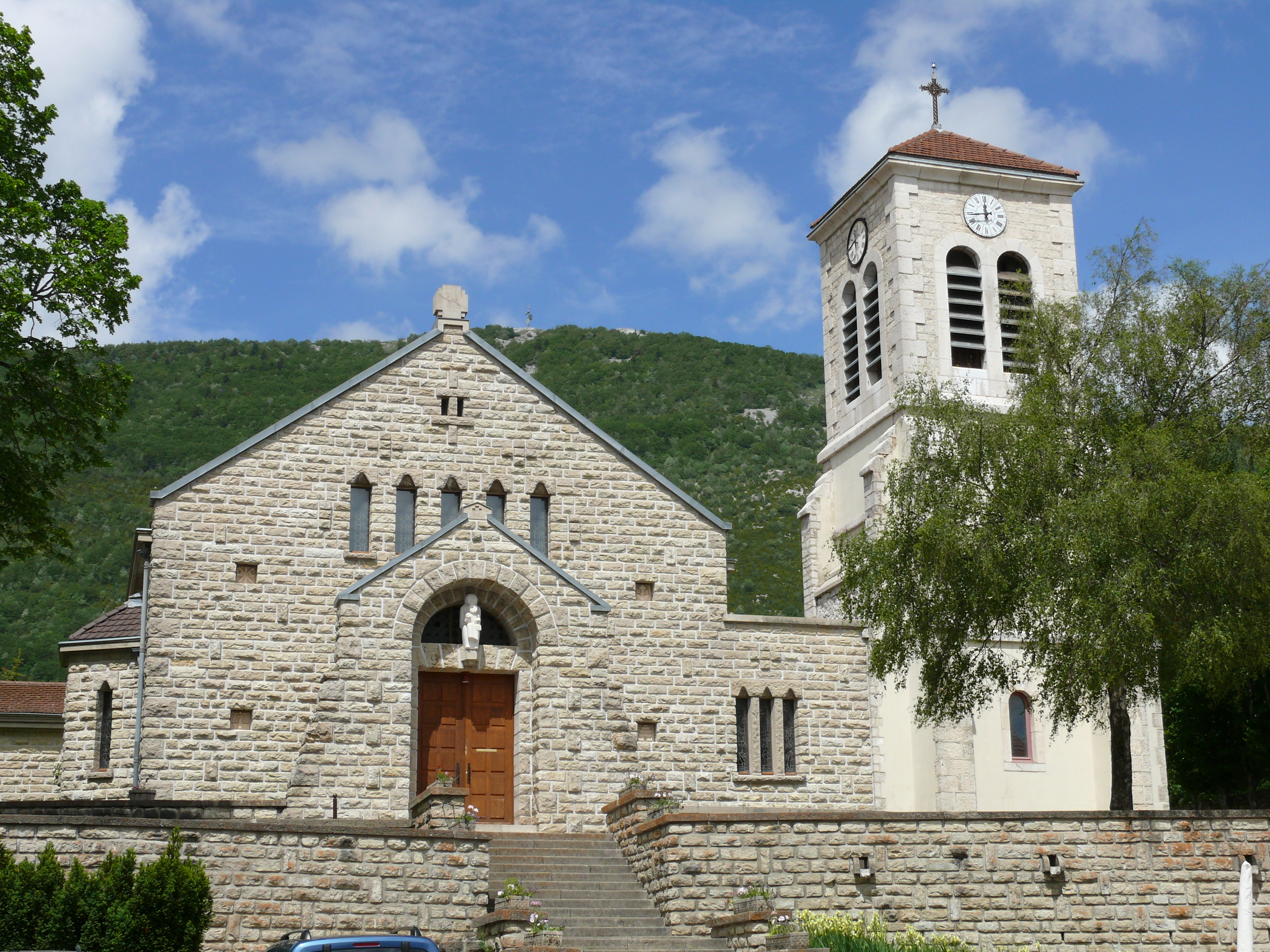 Vassieux-en-Vercors - Eglise